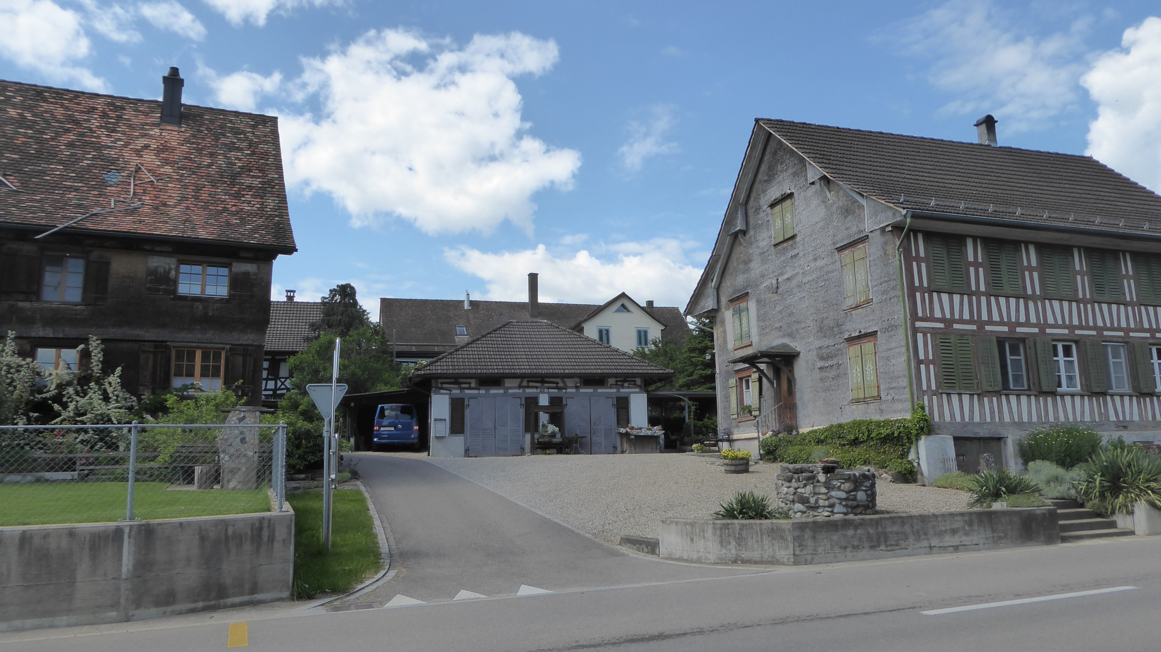 Kümmertshausen